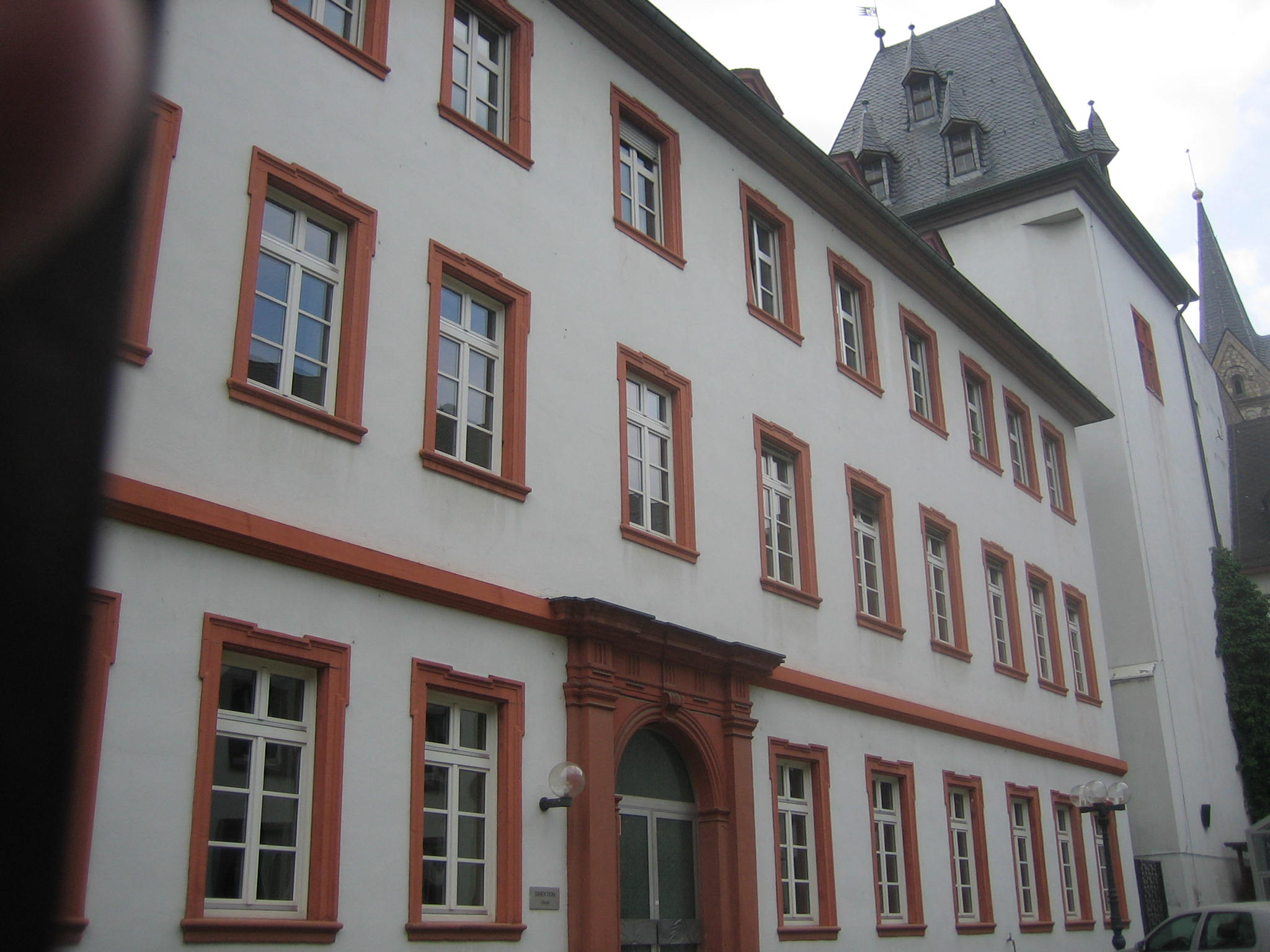 Fechenbacher Hof, Hauptfassade zum Hof. Errichtet für Dietrich von Dalberg bis 1718.